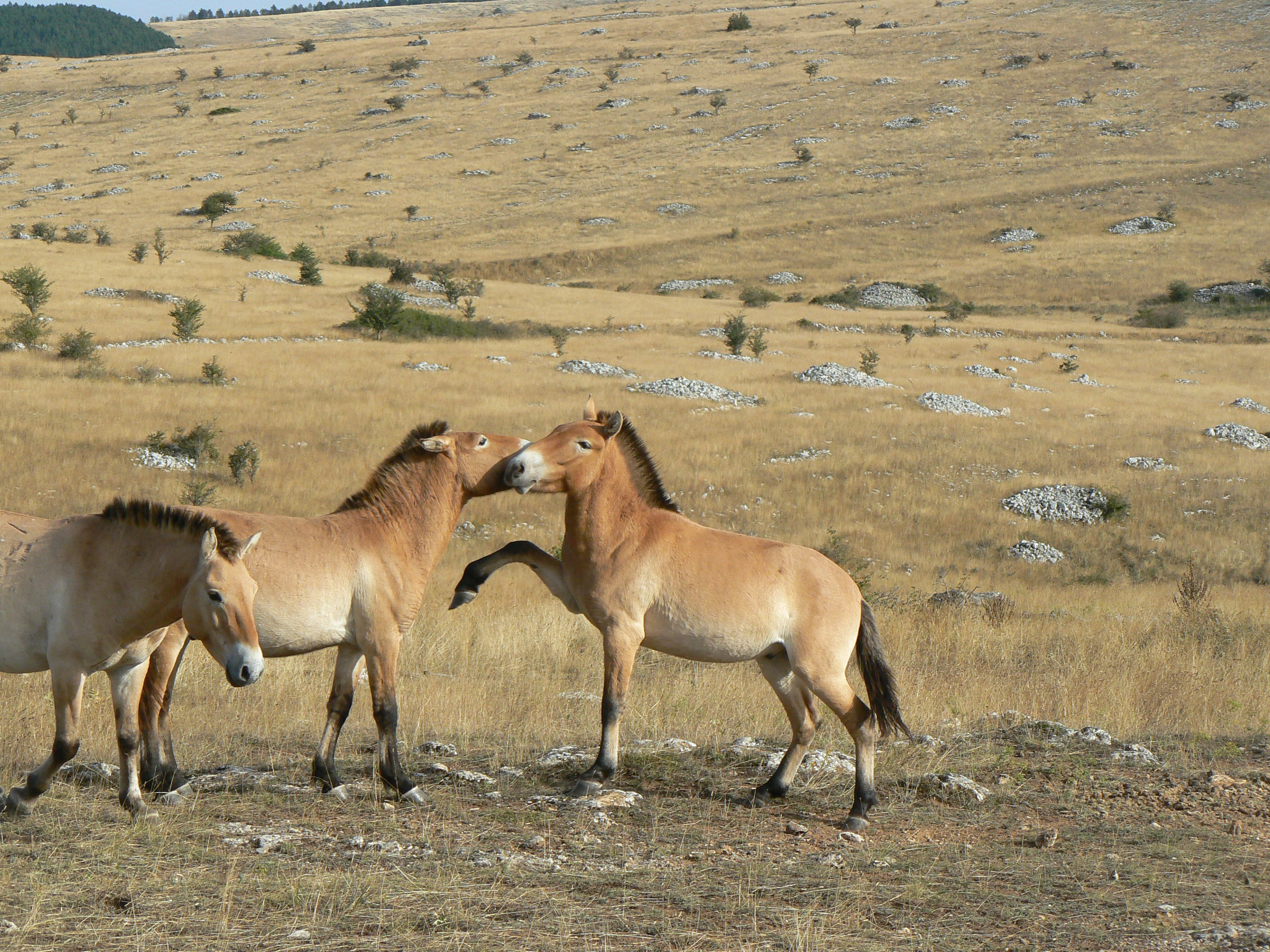 Chevaux de Przewalski sur le causse Méjean en Lozère